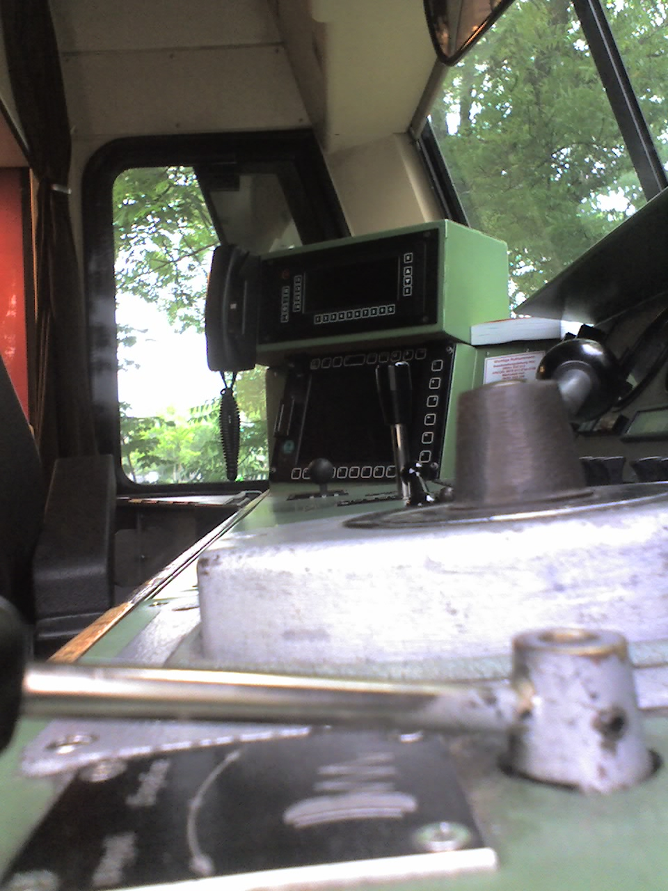 Führerstand der DB-Baureihe 628 420-2